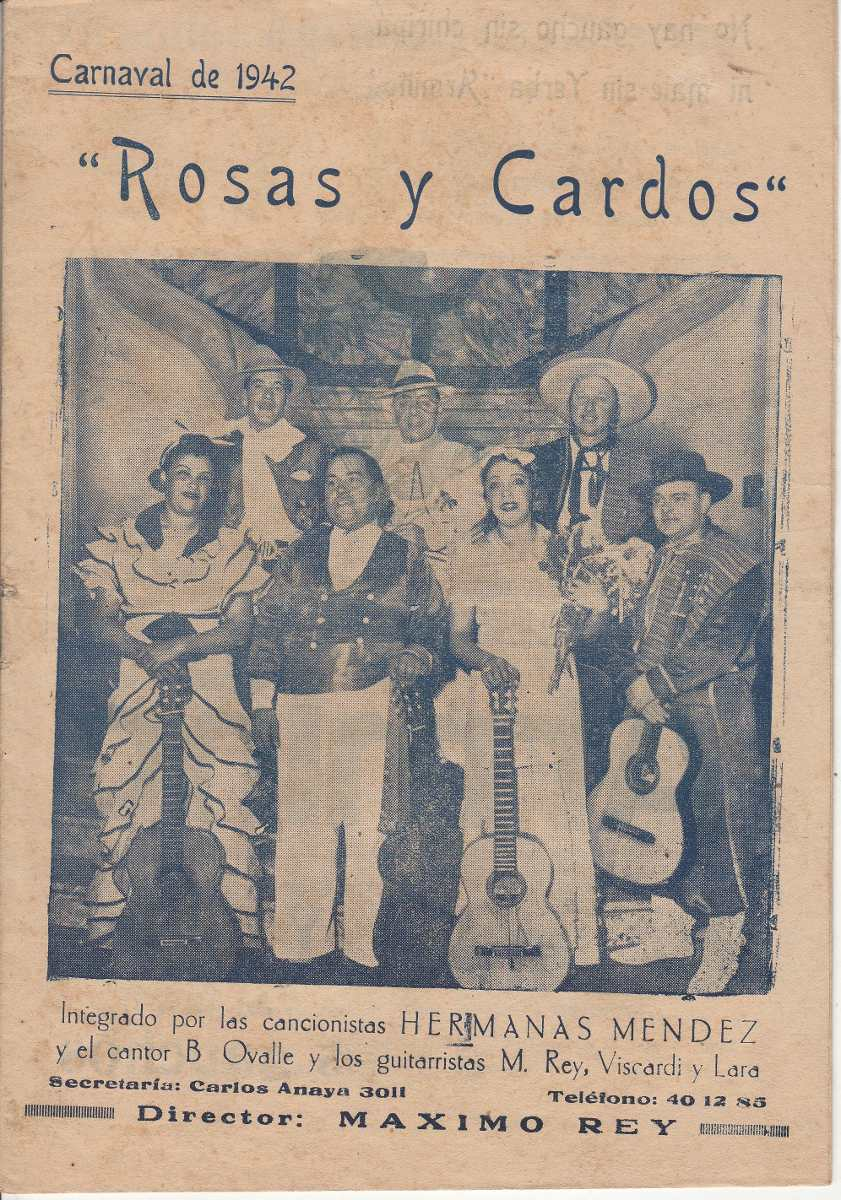 Imagen que forma parte de un programa del carnaval montevideano de 1942.